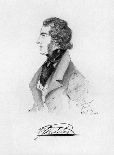 Charles Augustus Bennet, 6th Earl of Tankerville